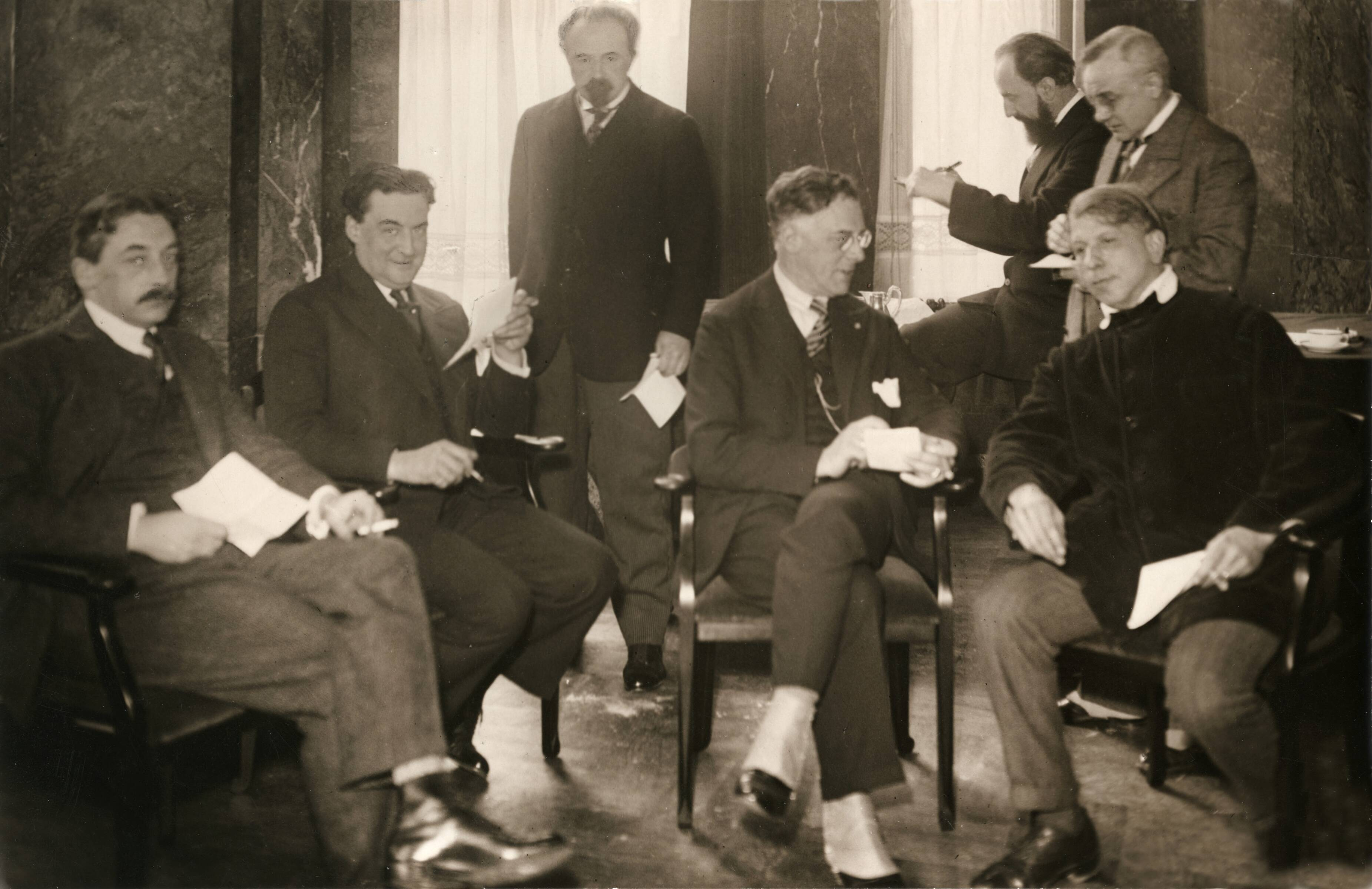 Miss Verkiezingen. De jury voor de Miss Holland verkiezing 1929. Eerste van links de dichter Mr. H.W.J.M. Keuls, 2e van links Louis Saalborn, 3e van links Jan Sluyters (staand). Zittend tweede van rechts: Jan Feith. Andere personen: Martin Monnickendam en Piet Kramer.